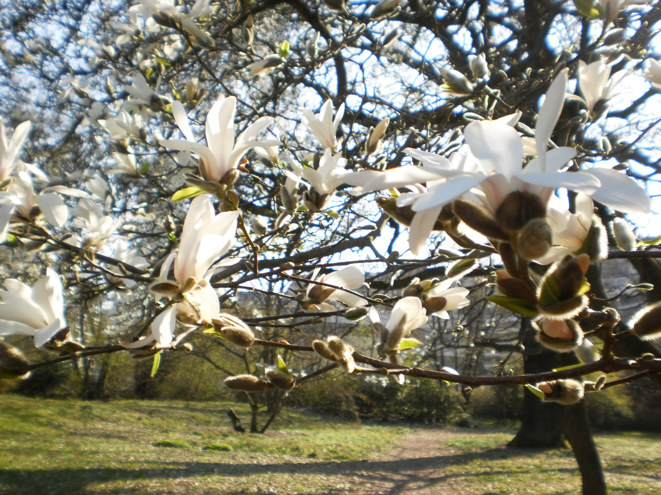 Der Duft und ein Hauch zartweisser Magnolienblüten im alten botanischen Garten in der Innenstadt von Marburg (vermutlich Magnolia kobus) vor dem Hintergrund des Hangs hoch zur Oberstadt und einem Blick zum Deutschen Sprachatlas am Pilgrimstein im Frühjahr 2019 (Hessen), ein Foto am sonnigen 1. April.